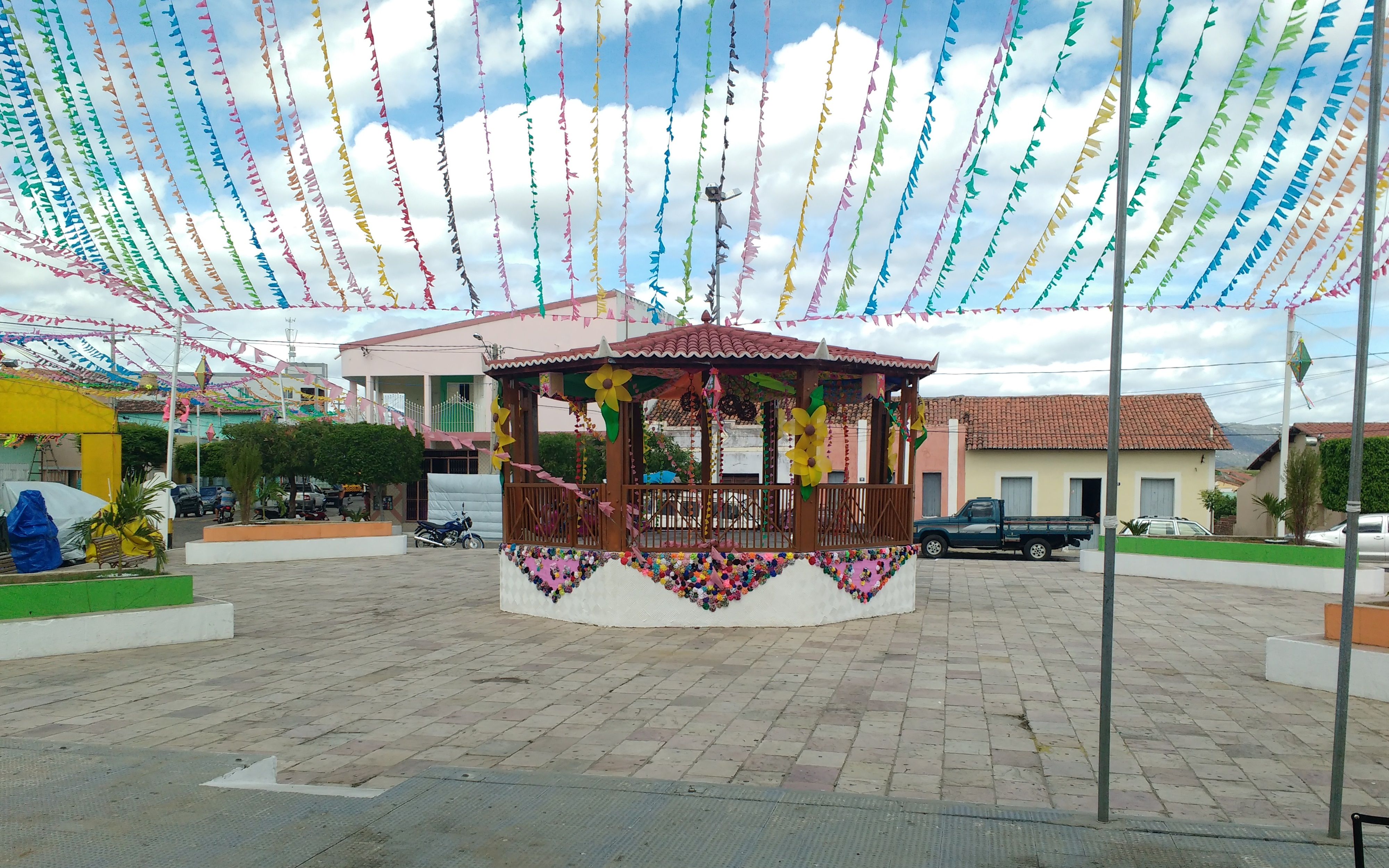 Coreto da praça da Igreja Matriz de Santo Antônio em Marcelino Vieira, Rio Grande do Norte (Brasil), enfeitada durante o mês de junho, época da festa do padroeiro Santo Antônio e das festas juninas.